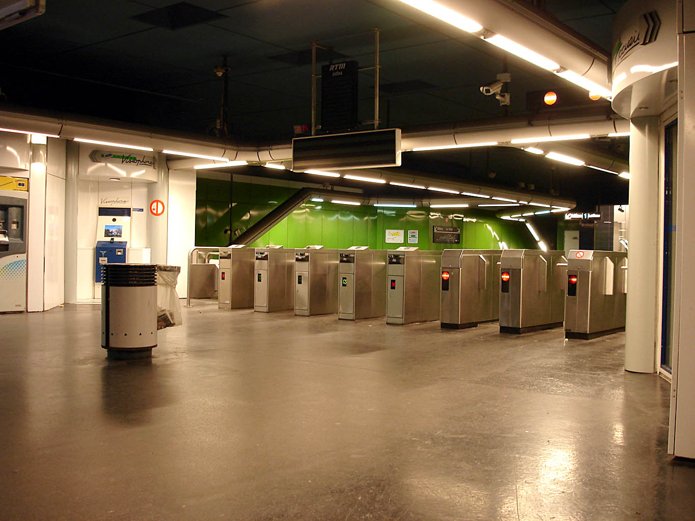 Station La Timone du métro de Marseille, France.